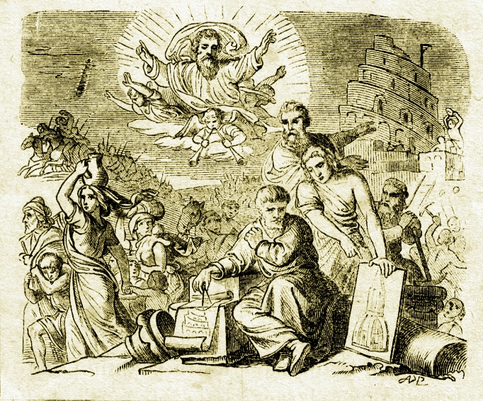 "Wieża Babel". Rycina ze schrobenhausenowskiego warsztatu Carla Poellath